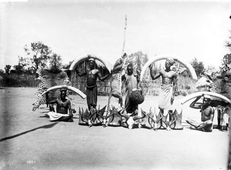 Jagdtrophäen